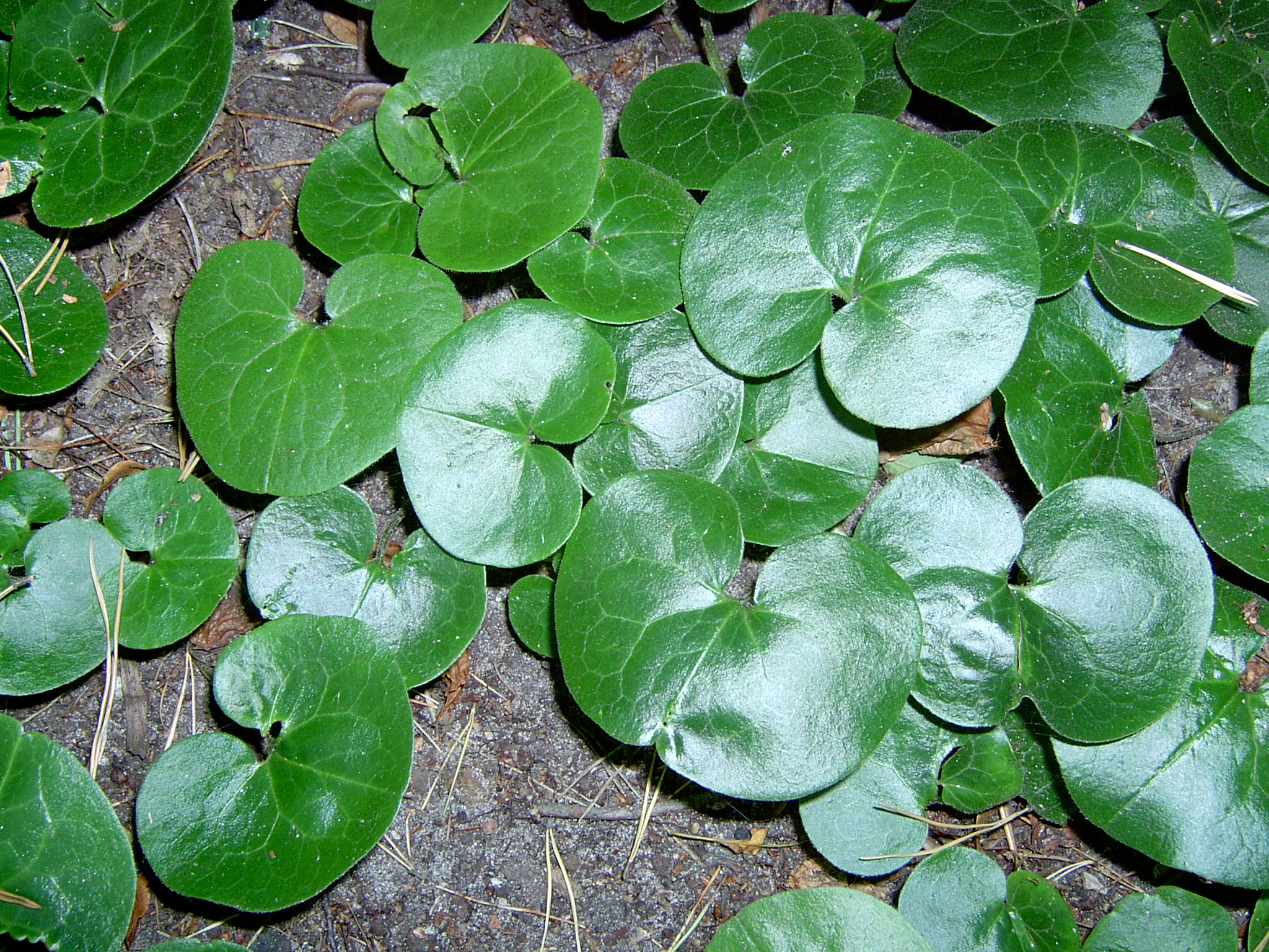 Leaves of Asarum europaeum